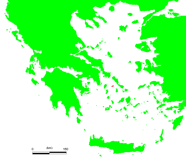 GR Gyaros.PNG (Greek island)